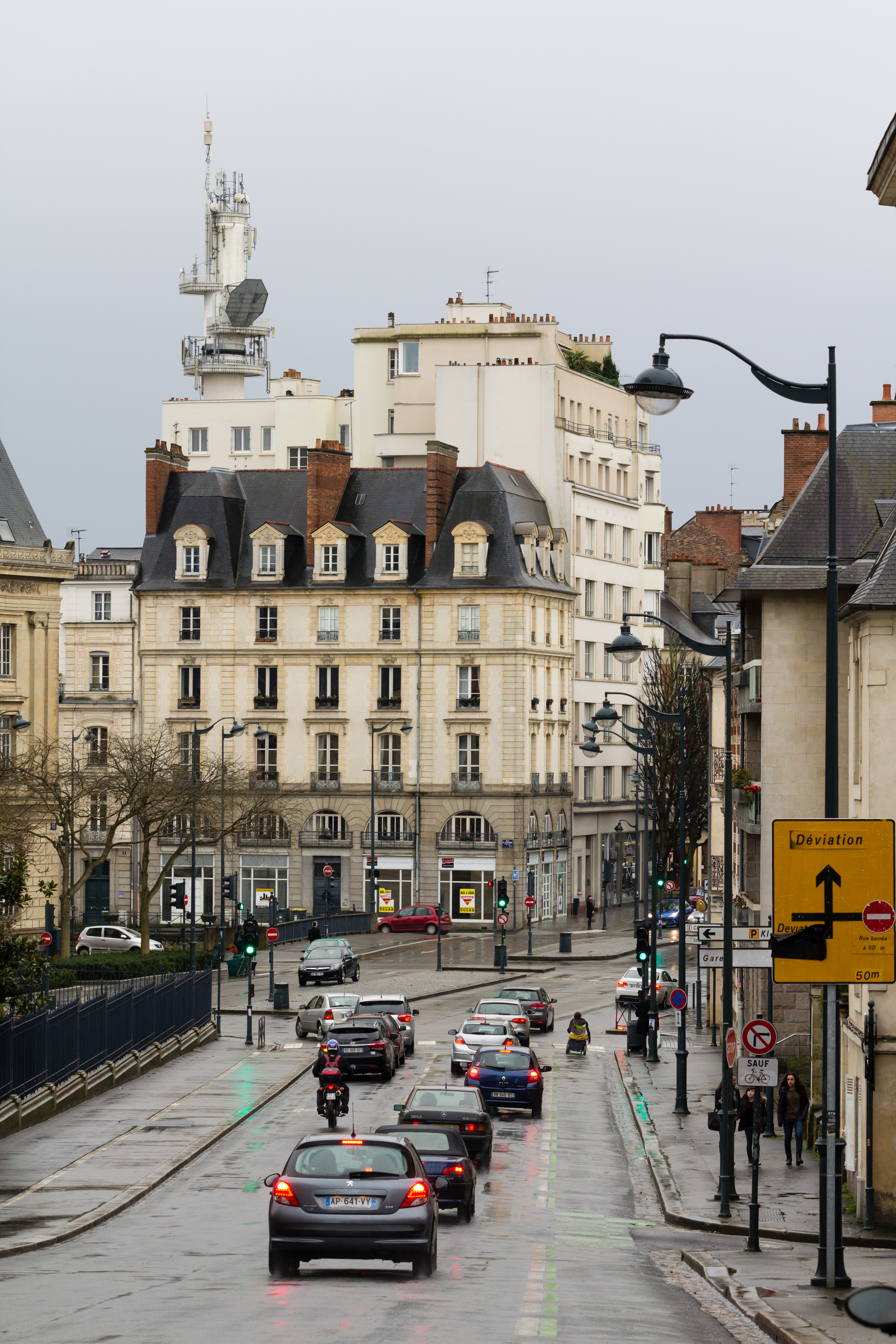 Bas de la rue Gambetta, place Pasteur et quai de Richemont à Rennes. La tour de télécommunication de France 3 Bretagne se dresse à l'arrière-plan.